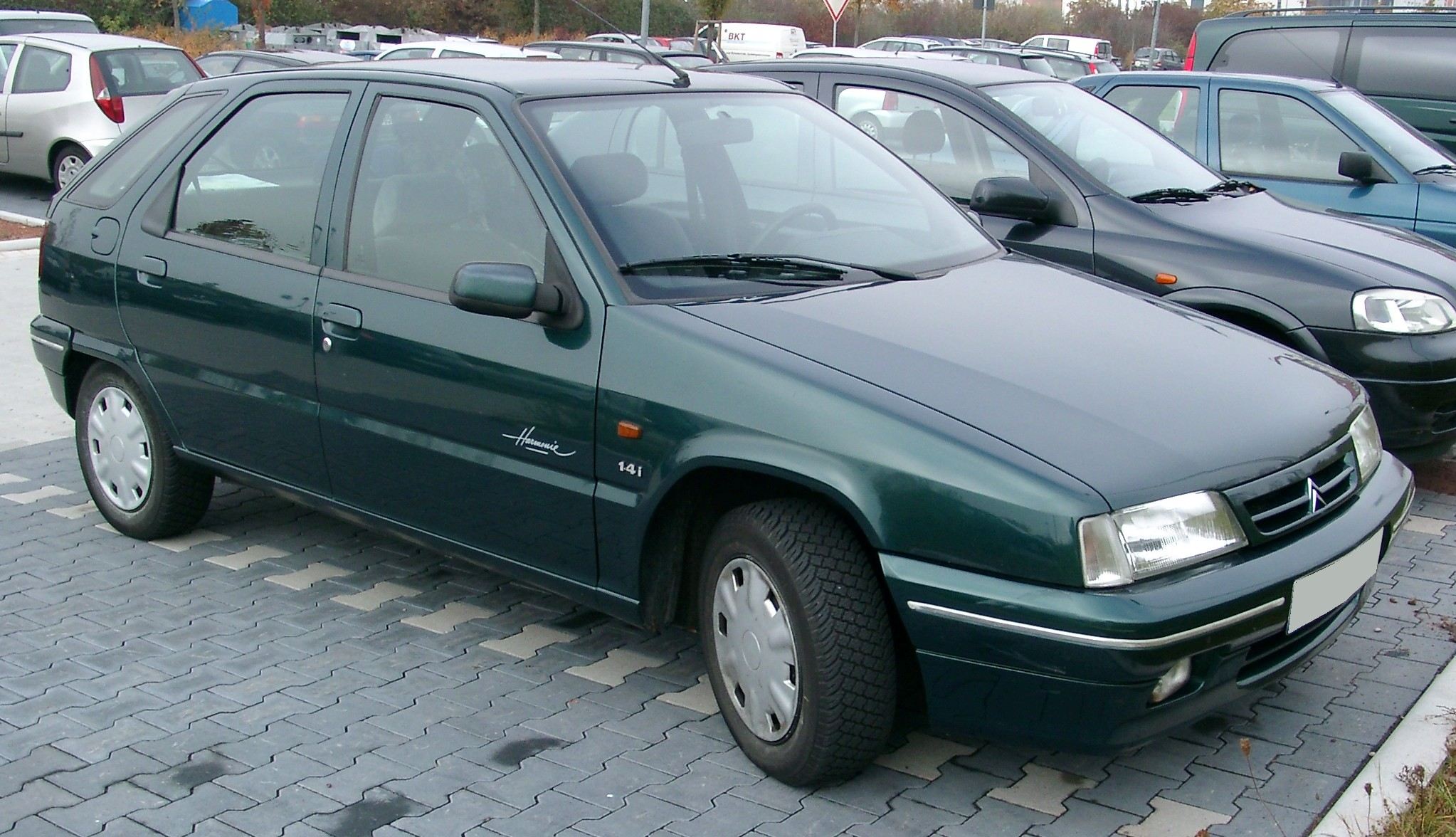 Citroën ZX